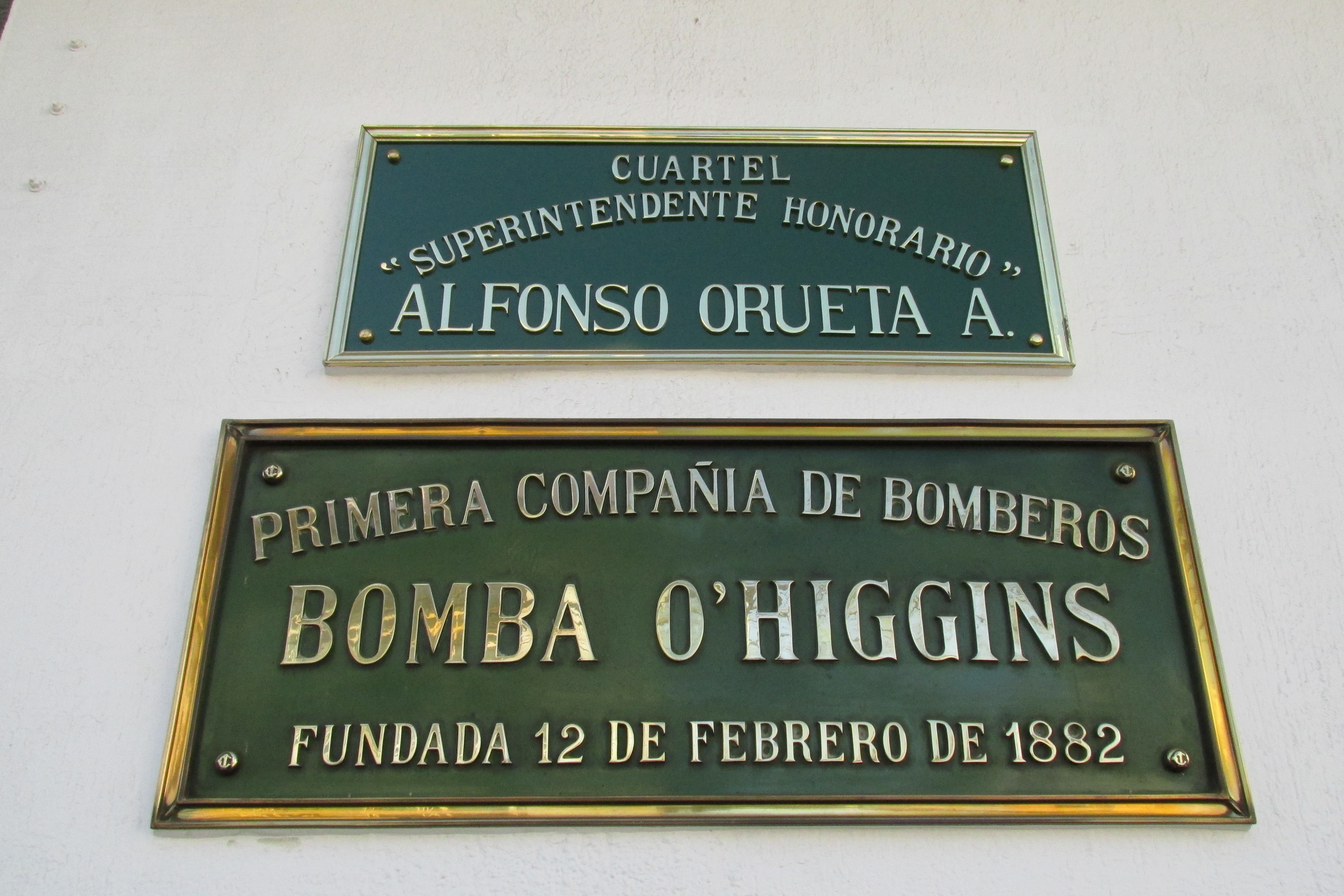 Placa de fundación 1 Compañia de Bomberos de Rancagua, ubicada en el frontis del edificio